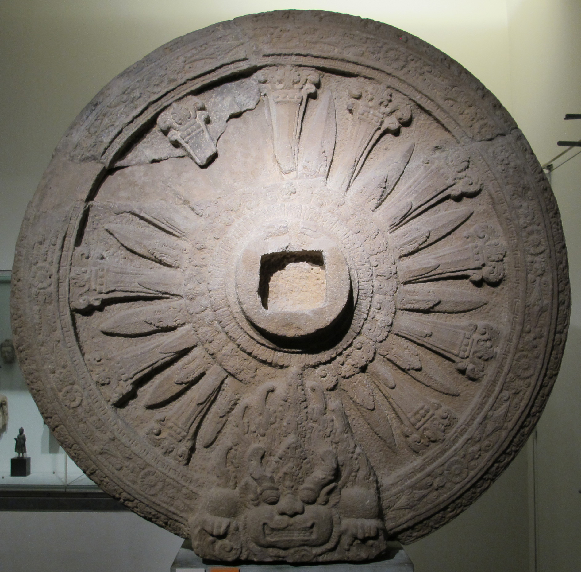 Thailandia, ruota della legge (dharmacakra), prov. ignota, arte dvaravati, viii-ix sec